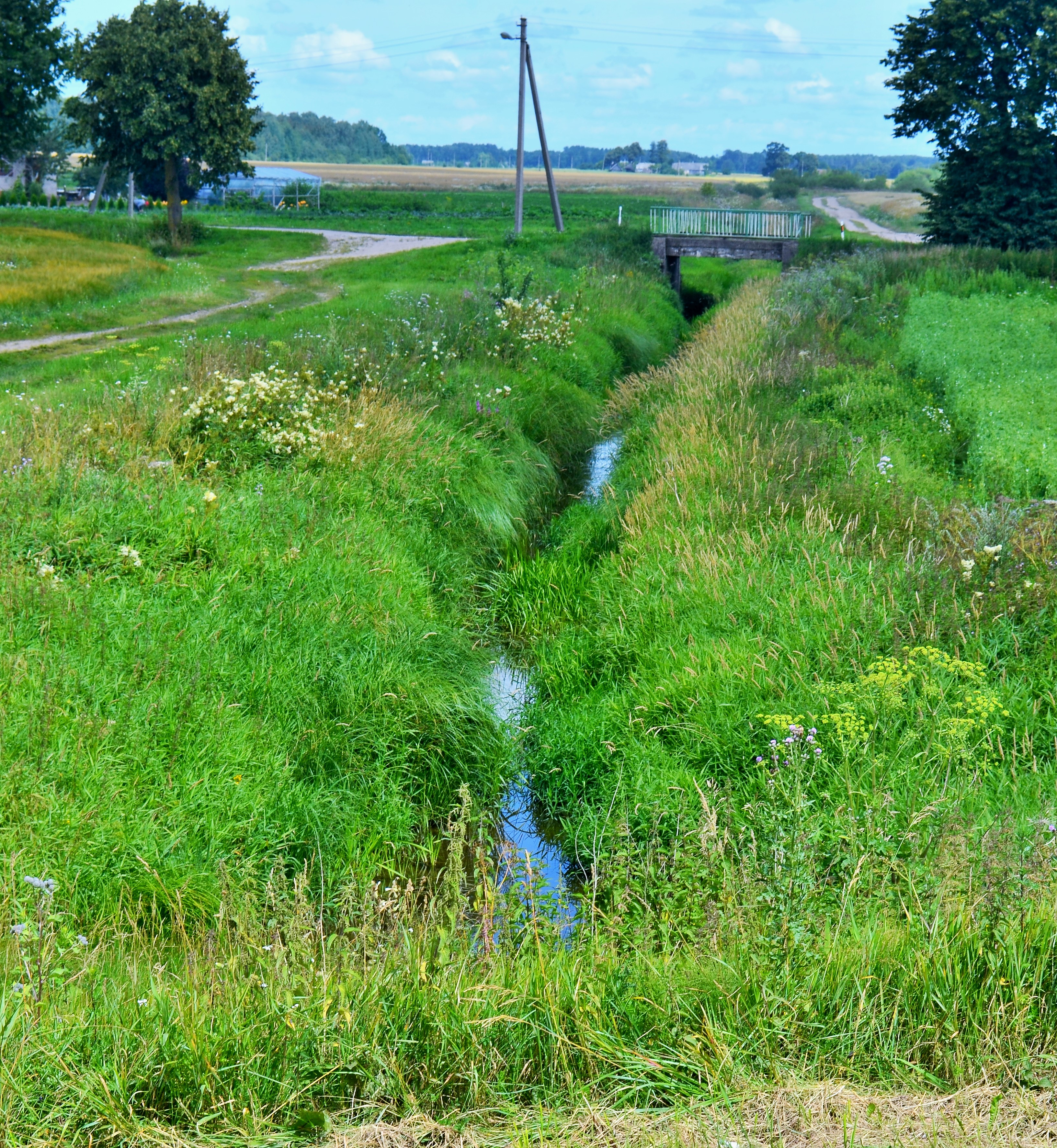 Kruostas ties Šlapaberže, Kėdainių raj.